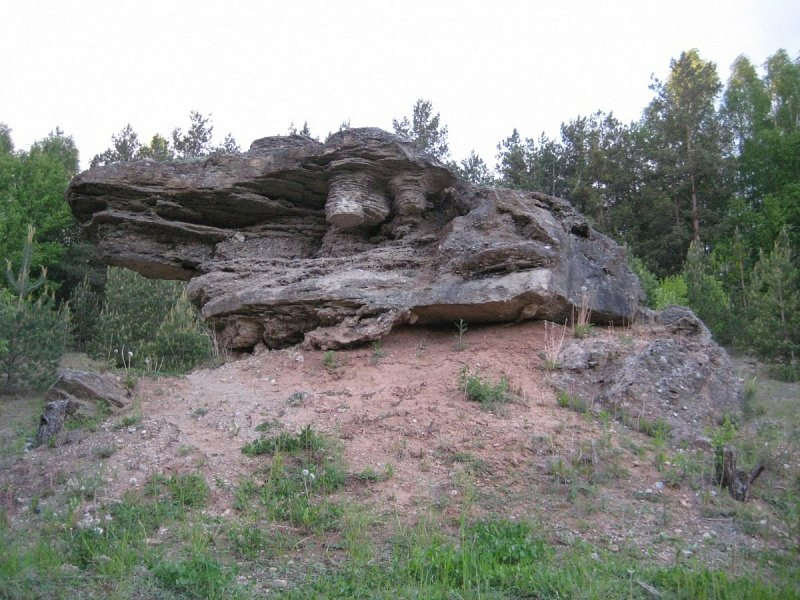 Старына. Пясчаная камлыга